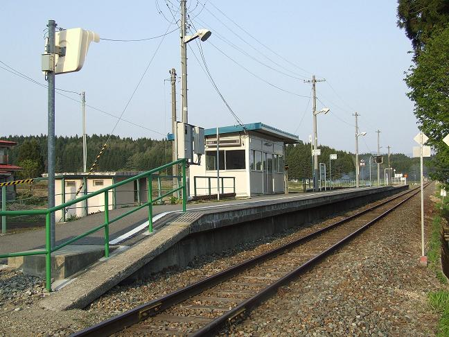 JR鵜杉駅